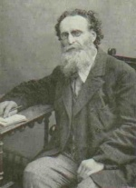 Jan Bezděk